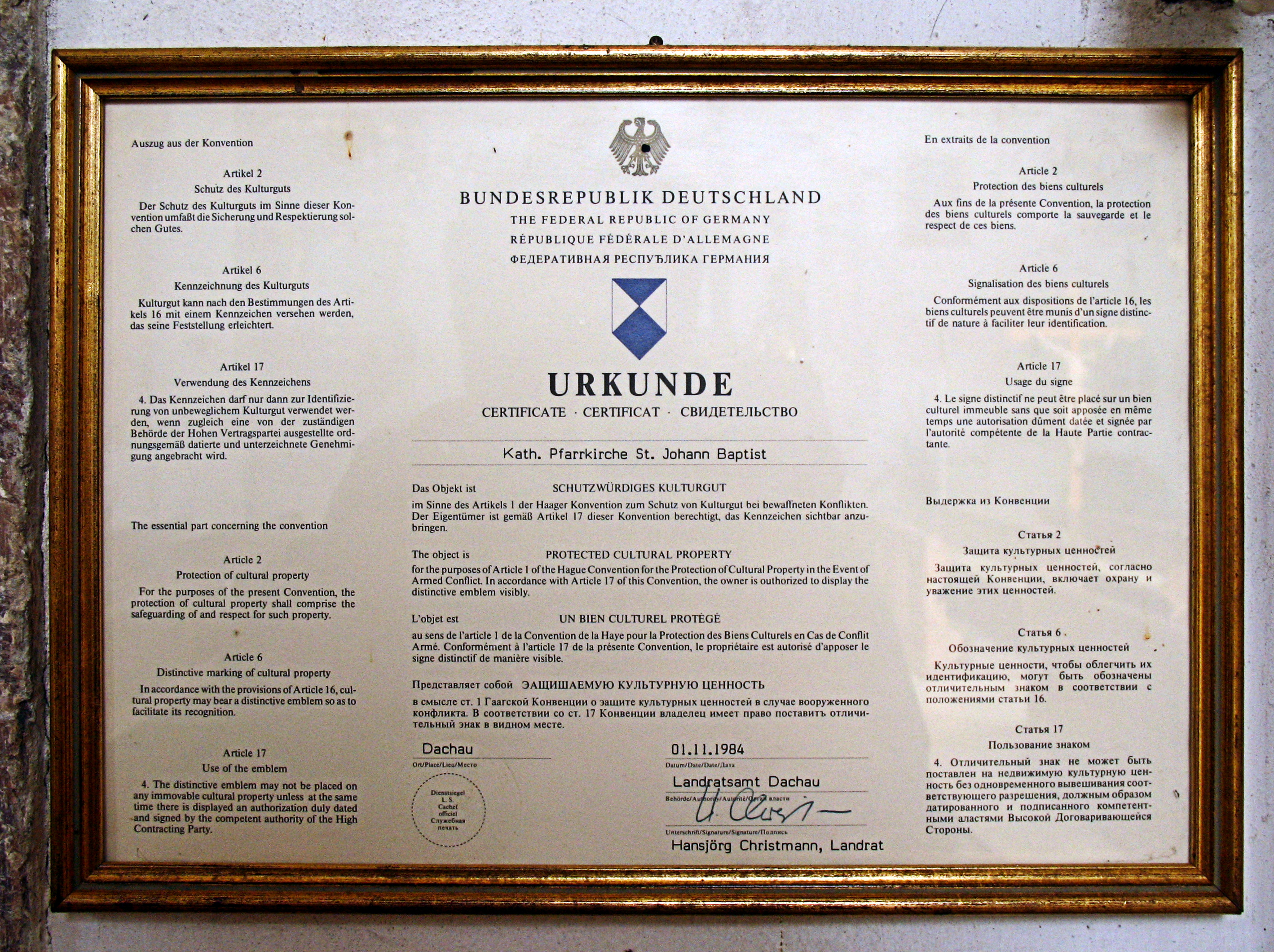 Deutschland, Bayern, Landkreis Dachau, Bergkirchen, Denkmalschutzurkunde für die katholische Pfarrkirche St. Johannes Baptist